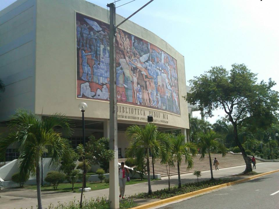 Biblioteca Pedro Mir, UASD Santo Domingo